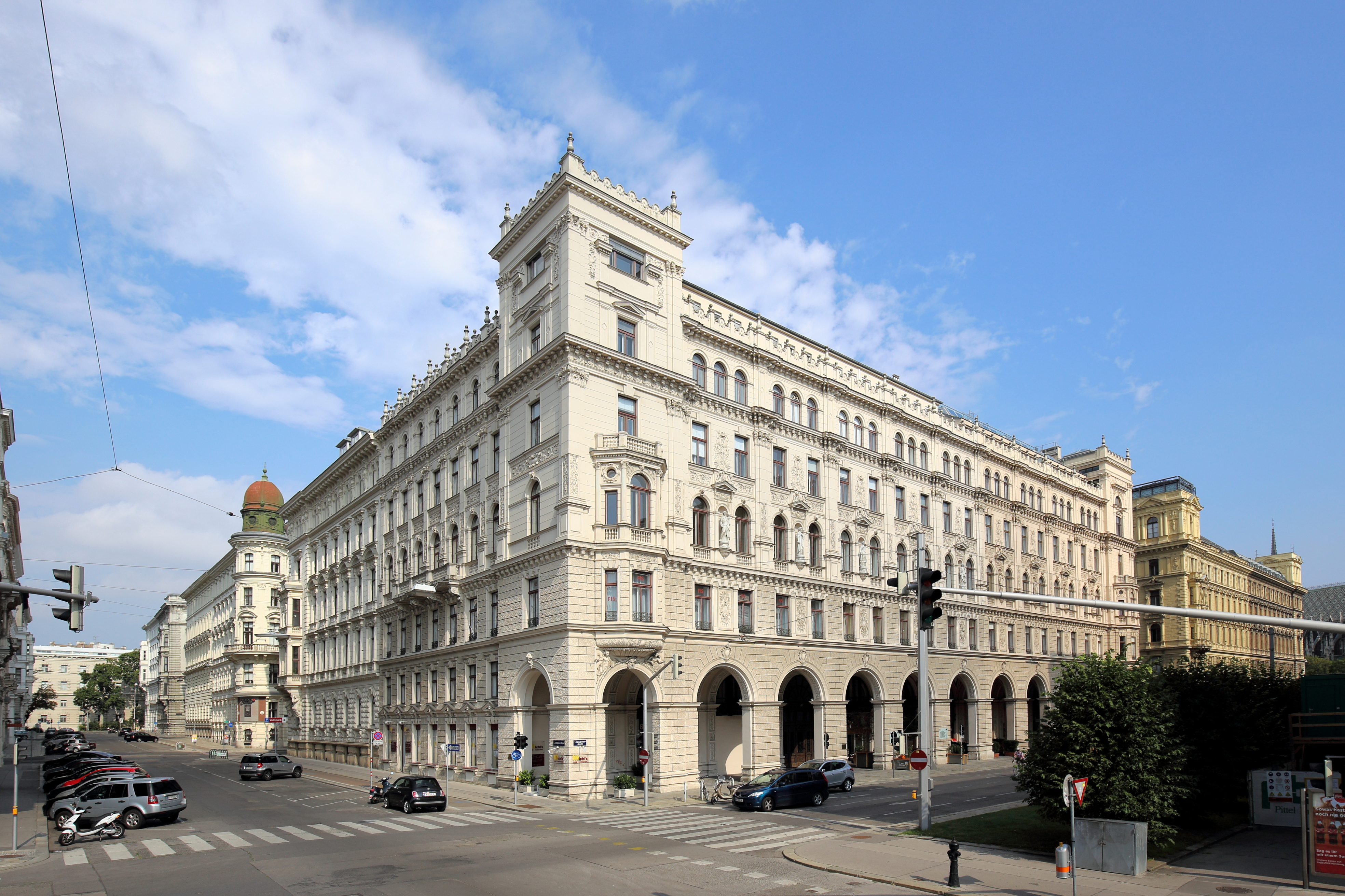 Wohnhaus Reichsratsstraße 11-13 in der österreichischen Bundeshauptstadt Wien. Das Arkadenhaus zwischen Grillparzerstraße und Liebiggasse wurde 1883 von Emil von Förster begonnen und 1887 von Dionys Milch fertiggestellt.